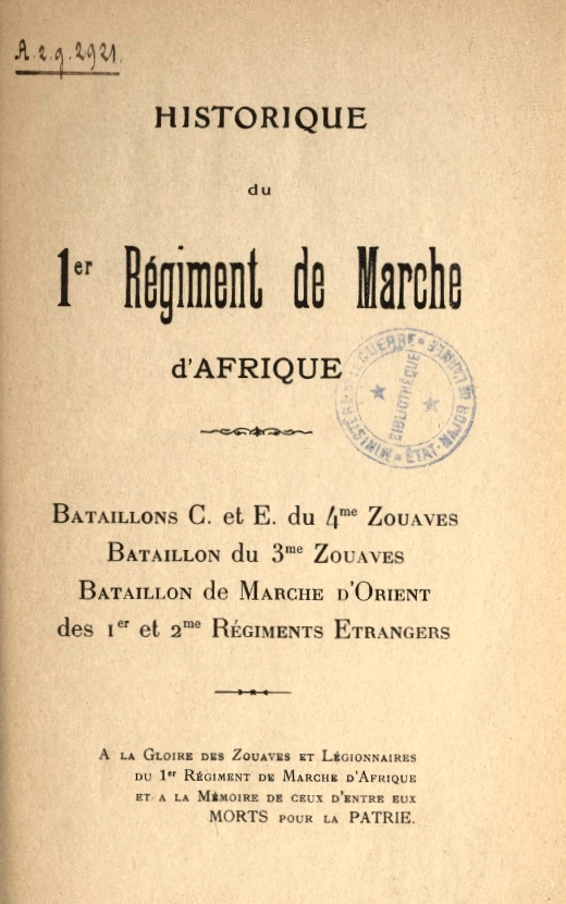 Historique du 1er régiment de Marche d'Afrique : bataillons C. et E. du 4me zouaves, bataillon du 3me zouaves, bataillon de marche d'Orient des 1er et 2me régiments étrangers Éditeur : Imprimerie française (Bizerte). Couverture.